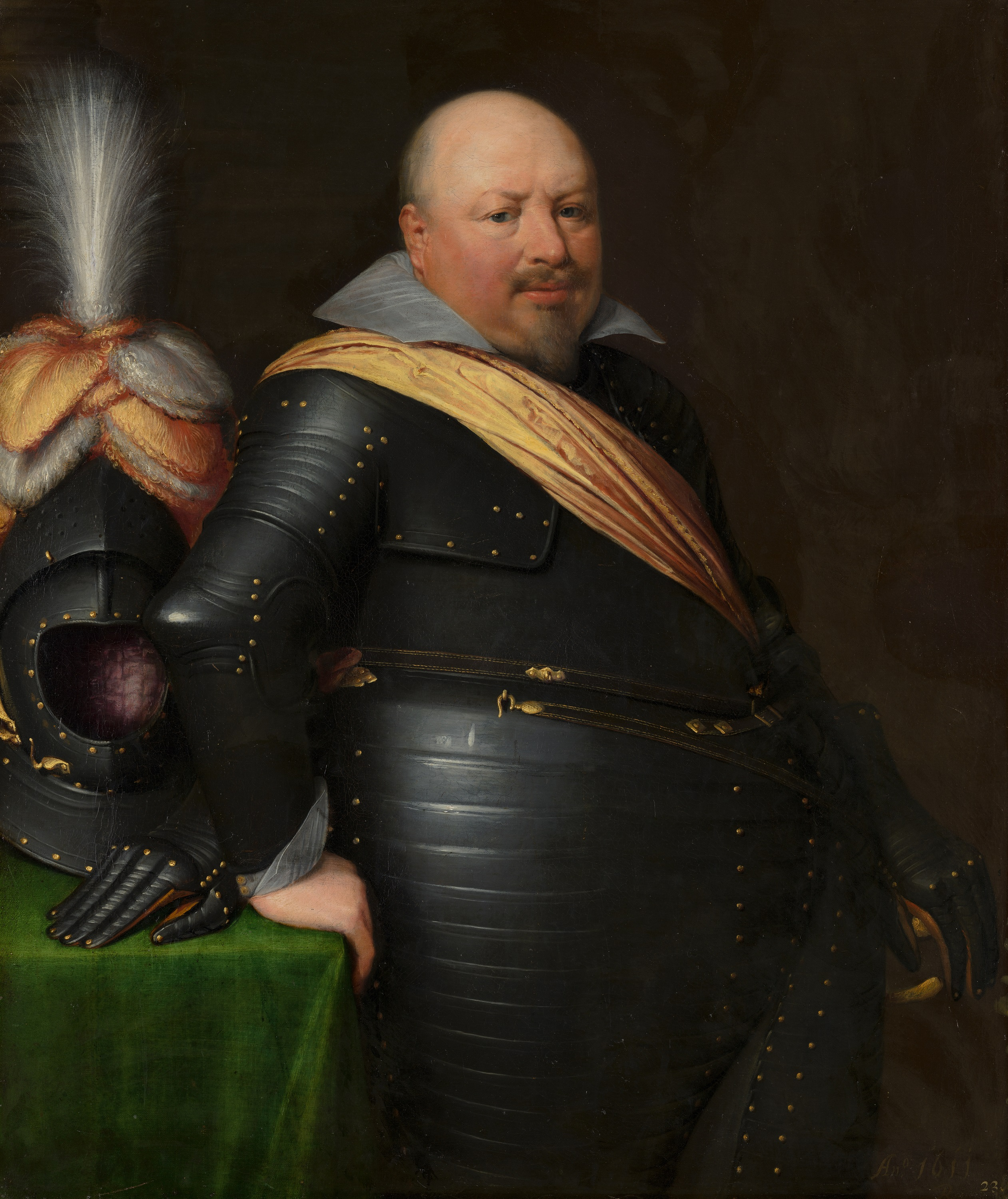 Portret van Nicolaas Schmelzing.